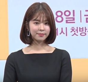 7일 오후, 서울시 강남구 논현동 임패리얼 팰리스 호텔에서 JTBC 새 금토드라마 '리갈하이'의 제작발표회가 열려 배우 진구, 서은수, 이순재, 채정안, 윤박, 정상훈이 참석했다.